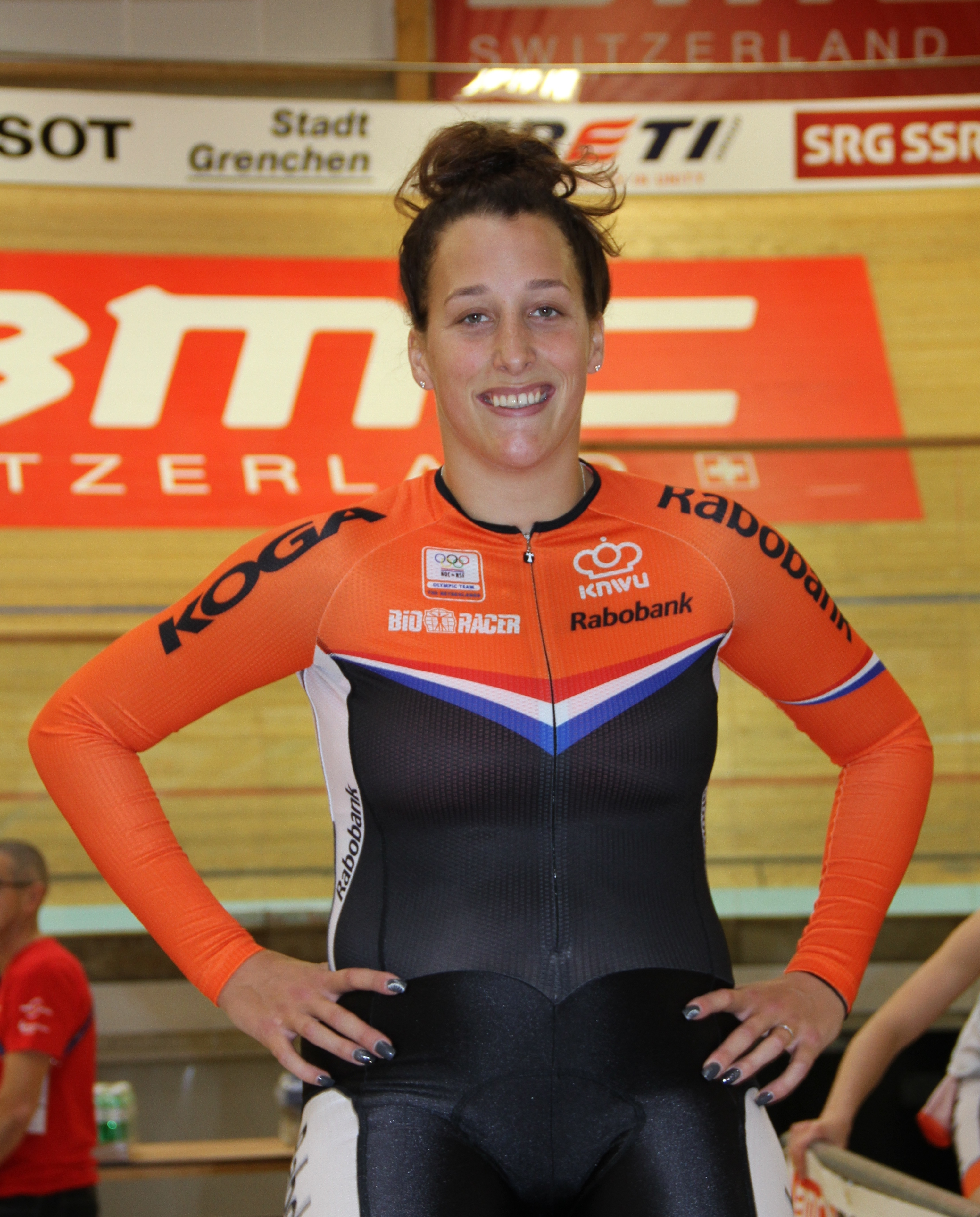 Elis Ligtlee, niederländische Radsportlerin The making of this document was supported by the Community-Budget of Wikimedia Germany.